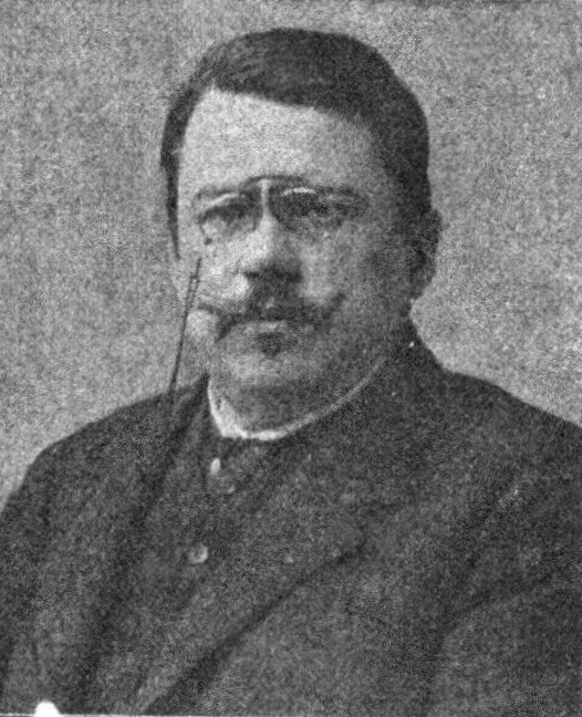 Österreichischer Politiker, Reichsratswahl 1907, Name siehe Dateiname